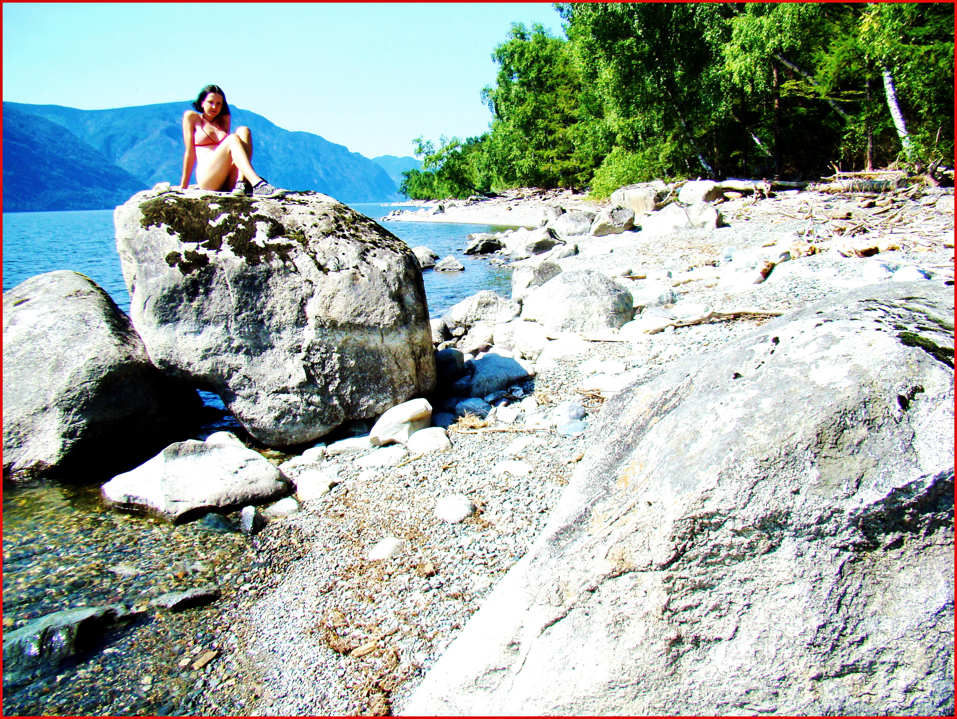 Слабообработанные и совершенно неокатанные дилювиально-эрратические глыбы гранитоидного состава на пляже Телецкого озера, Горный Алтай. Для масштаба на одной из глыб находится студентка Лена.